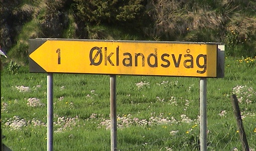 Bilete tatt av skiltet "Øklandsvågen". Bilete tatt av Marius Økland, mai 2004.